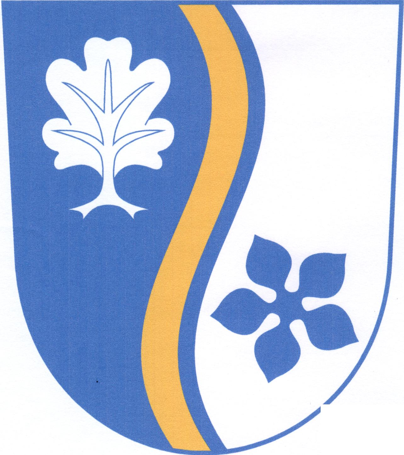 Znak obce Vidochov